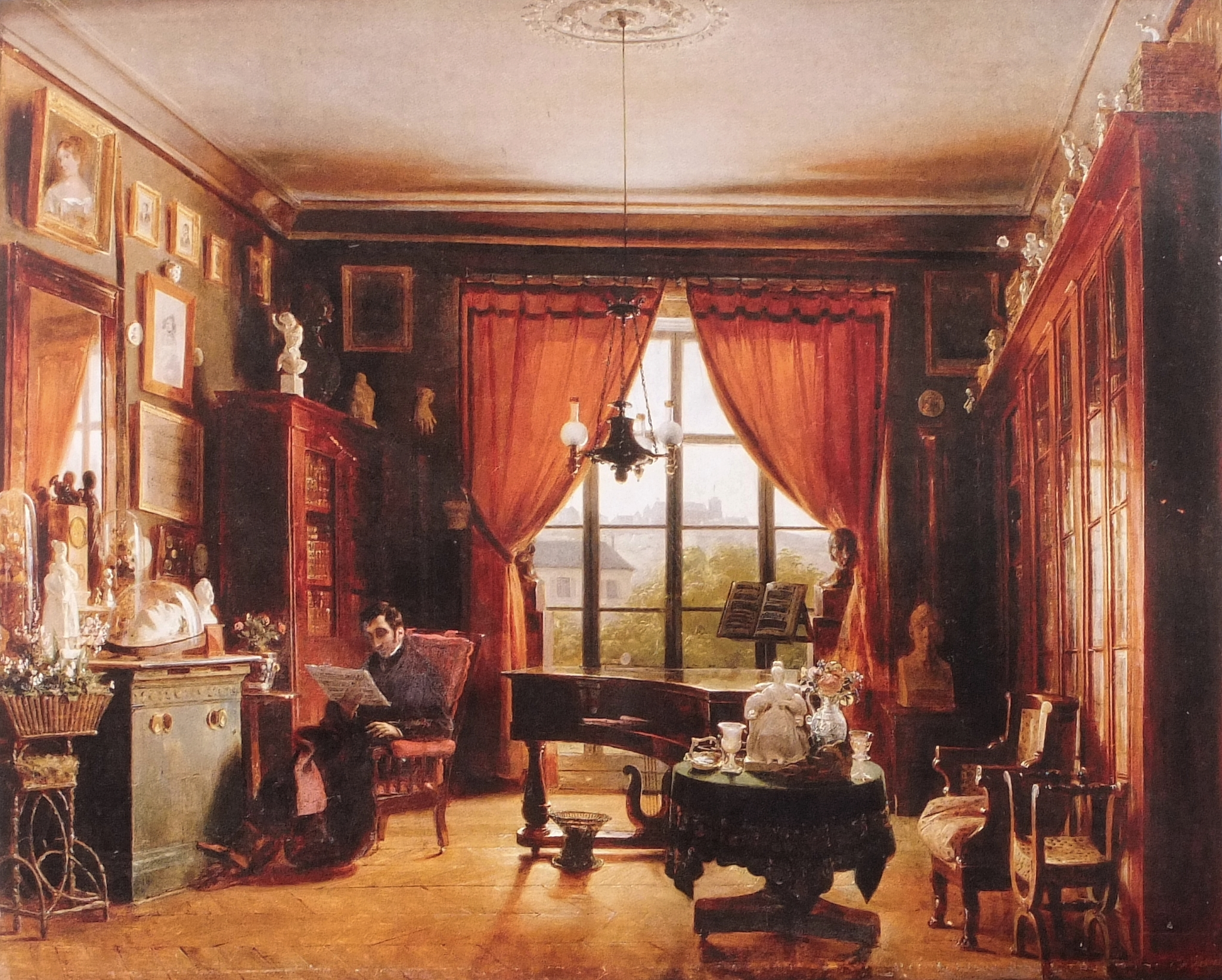 Le pianiste Pierre Joseph Guillaume Zimmermann dans son appartement Square d'Orléans à Paris, vers 1850 (?). huile sur toile de Prosper Lafaye. Musée du château de Versailles.